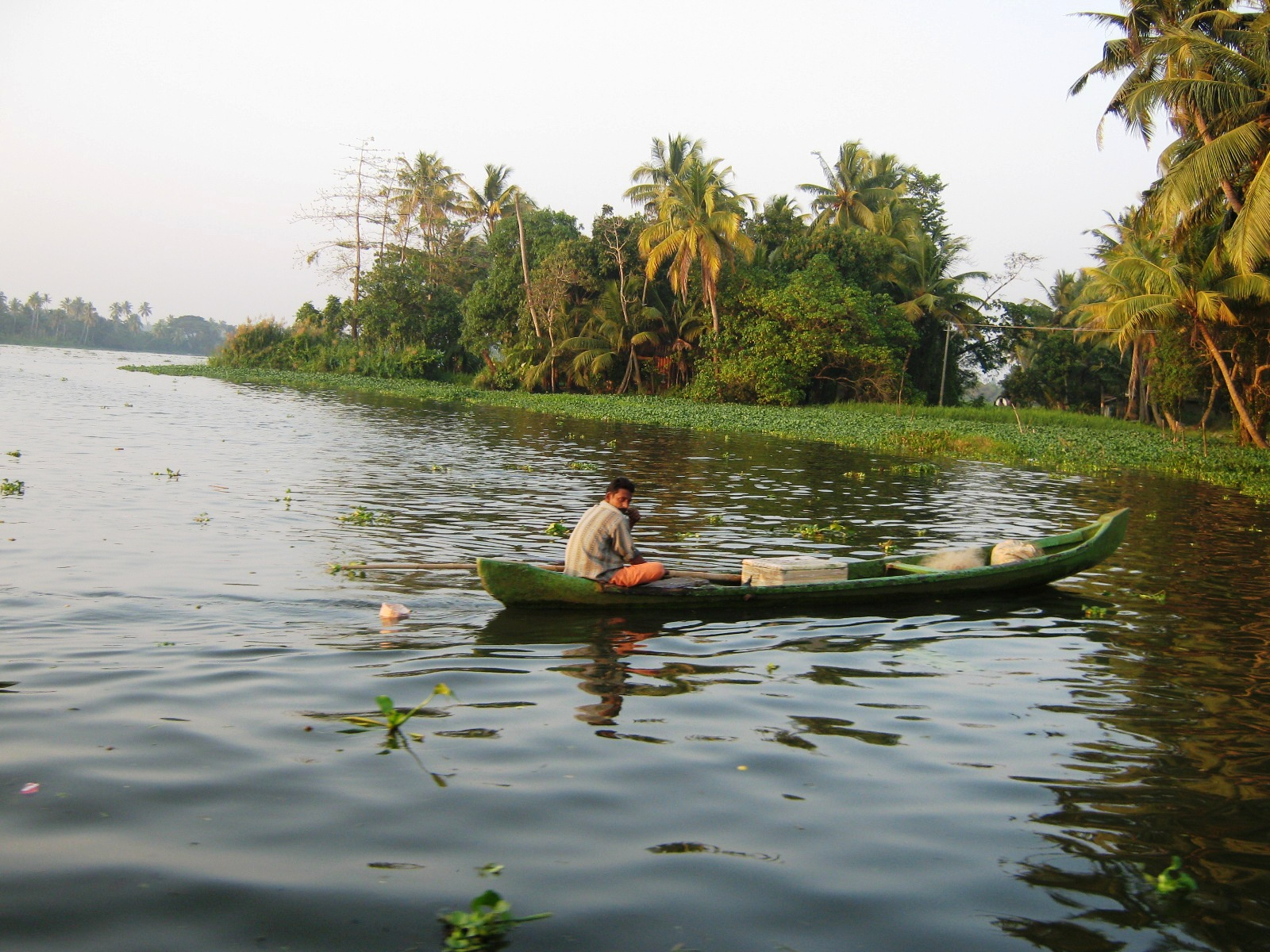 Alappuzha, Kerala, India.